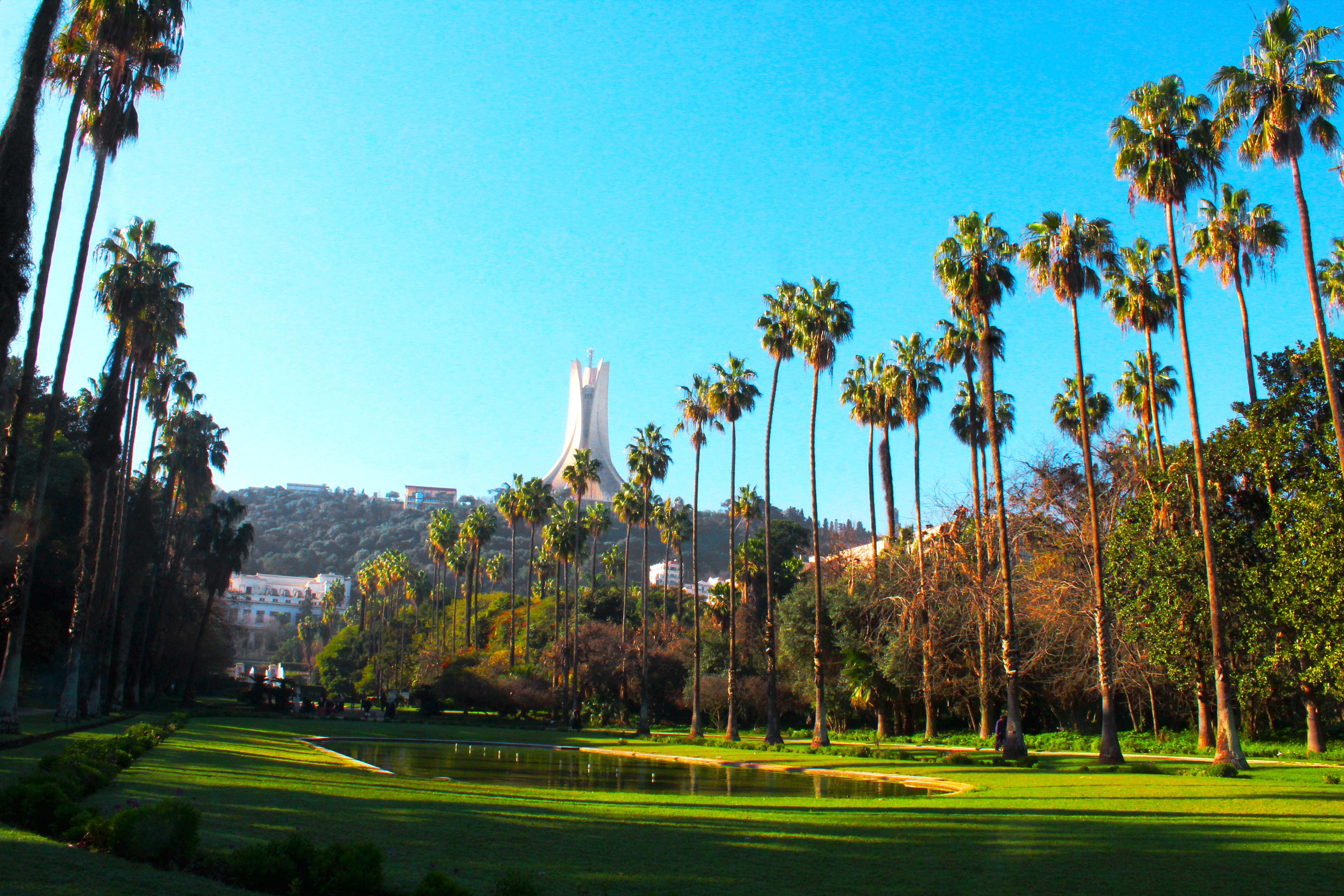 Jardin d'essai El Hamma, Alger , Algérie